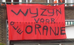 Spandoek in Hengelo